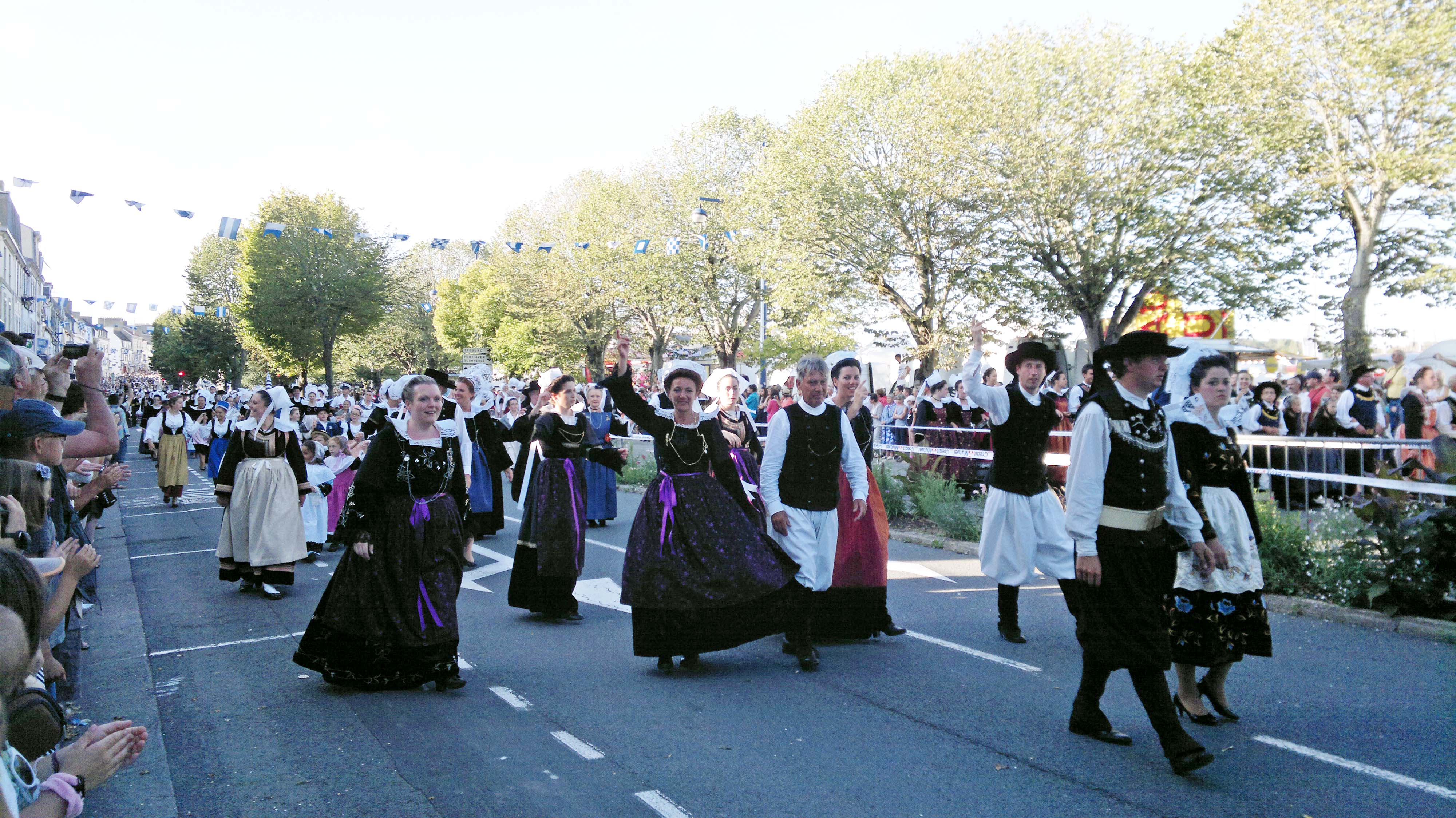 Festival des Filets bleus - Le Triomphe des Sonneurs 2012